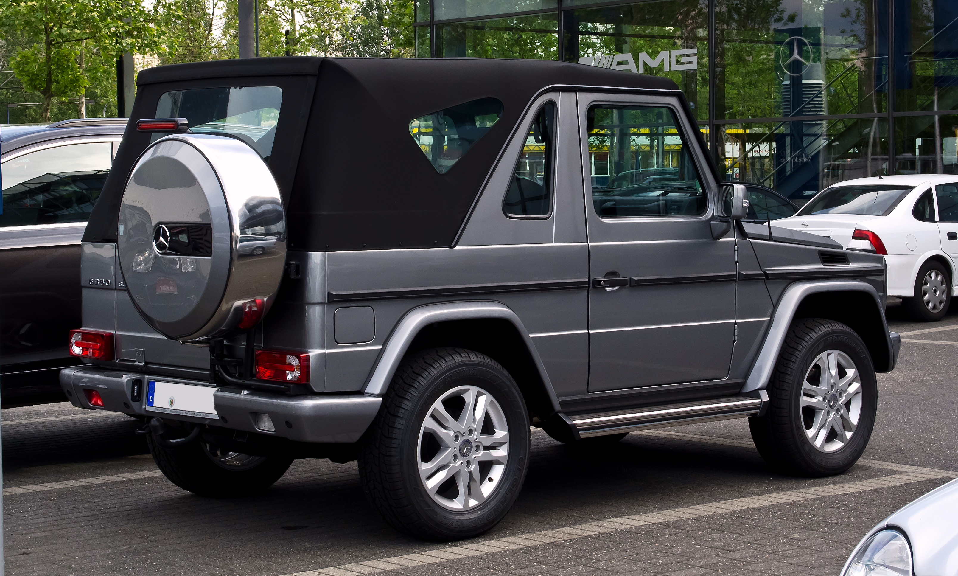 Mercedes-Benz G 350 BlueTEC Cabriolet (W 463, 2. Facelift)